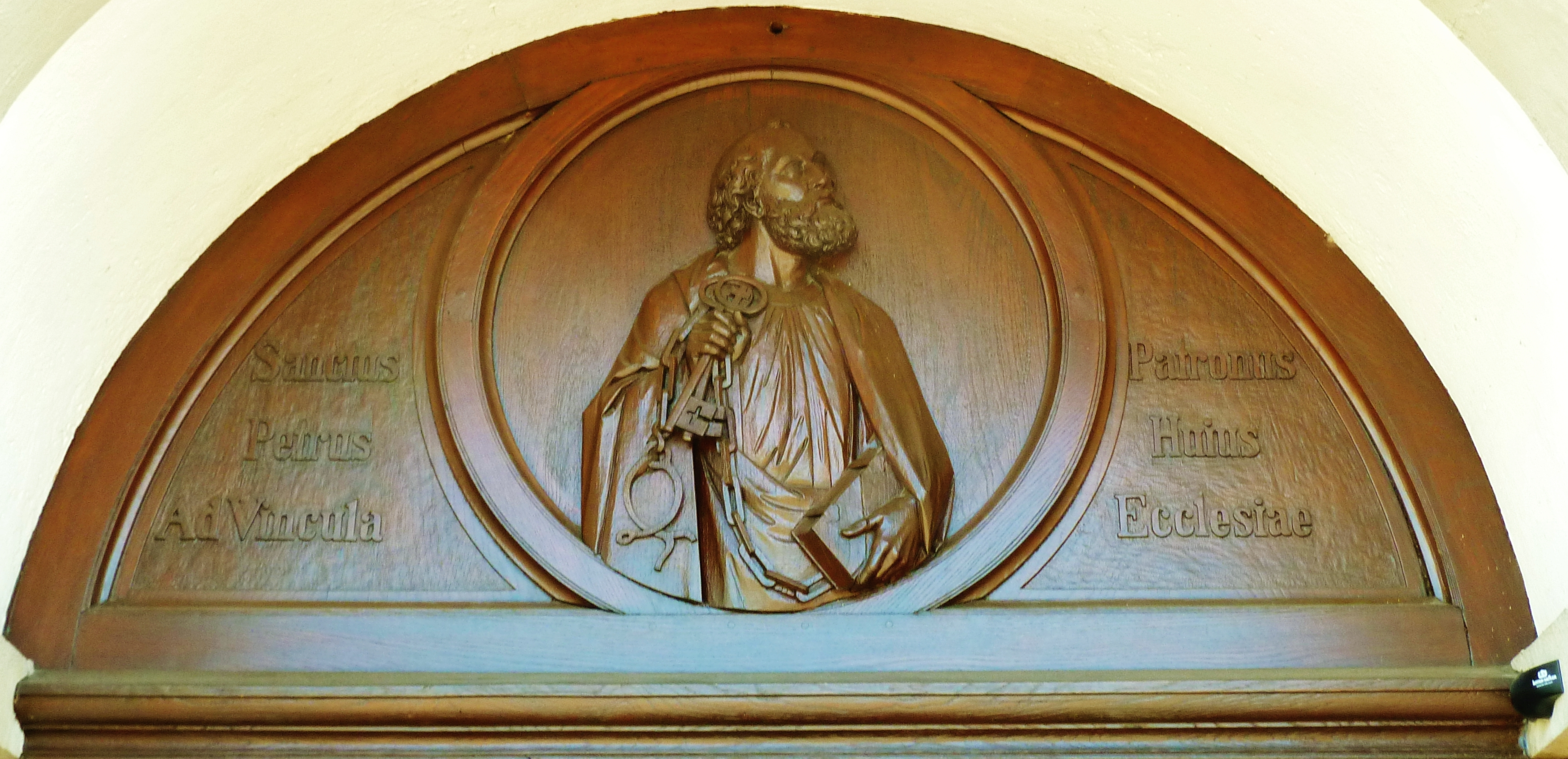 Inschrift über dem Portal der Petruskirche Gesmold